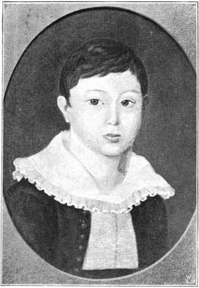 Historikeren P. A. Munch (1810–1863) som barn.